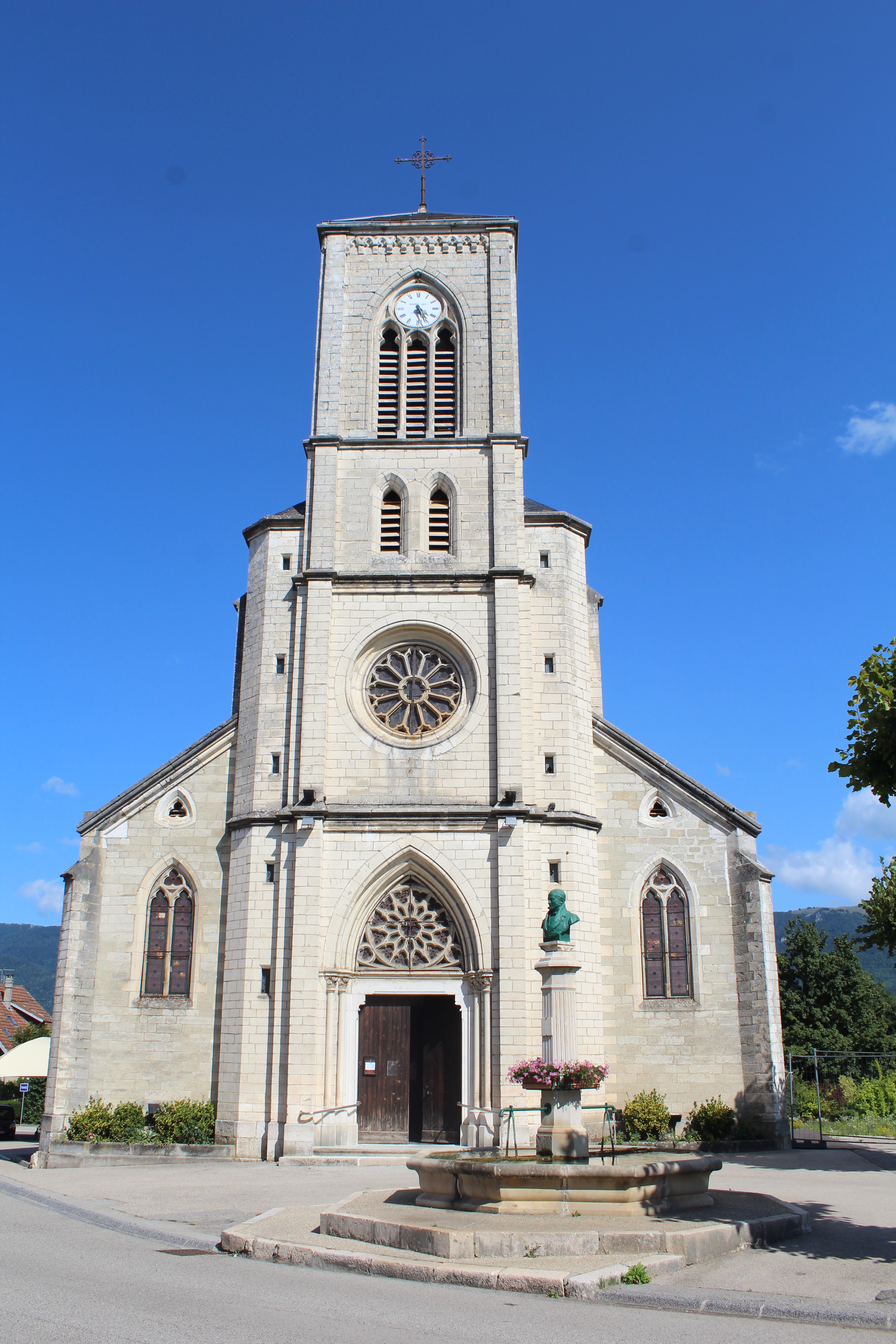 Église Saint-Symphorien de Champagne-en-Valromey.